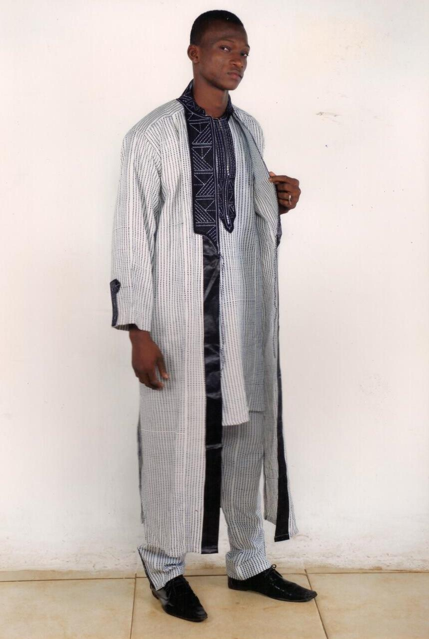 Ce tissu est s'appelle kendily est la représentation de la basse de la Guinée Conakry! c'est une identité Culturelle propre à cette zone du pays et la couture a été effectué par un styliste de la Guinée Conakry This is an image of Cultural Fashion or Adornment from Guinea